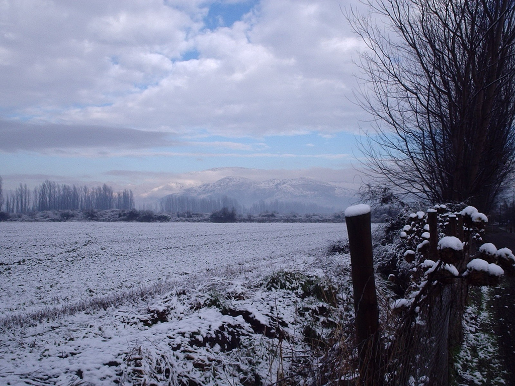 Vista a la localidad de Batuco, luego de un nevazon (Chile)